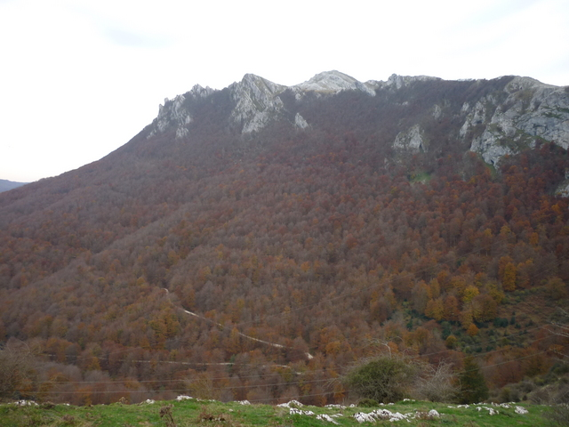 Altzania mendilerroa